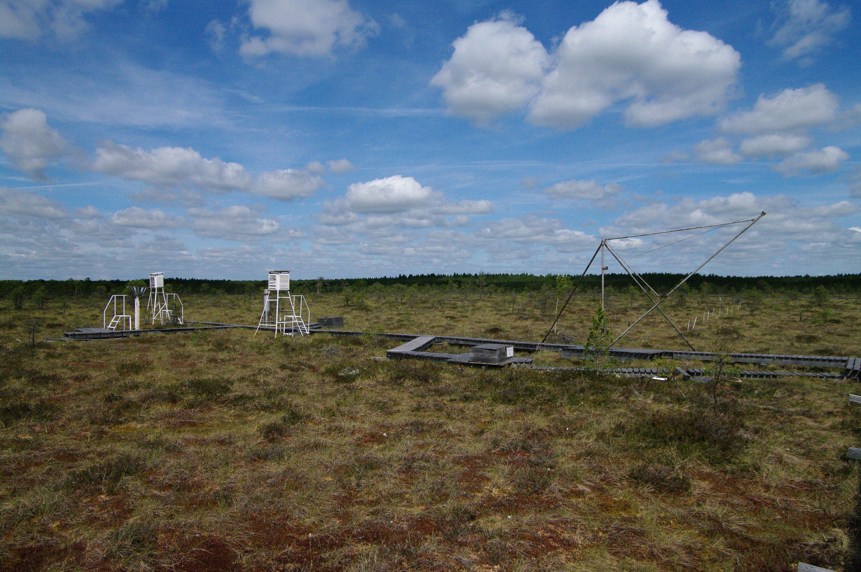 Vaatlusväljak Endla rabas